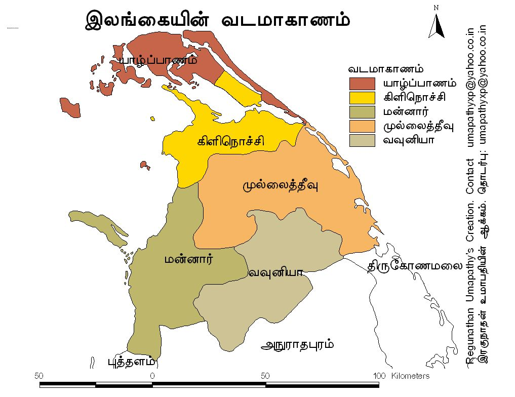 இது இலங்கையின் வடமாகாணத்தைக் காட்டும் அளவிடைக்கான் வரைபடம். இது தகவற் பரிமாற்றத்திற்கான தமிழ் நியமக் குறியீட்டு முறை உதவியுடன் ArcView மென்பொருளில் உருவாக்கப் பட்டது